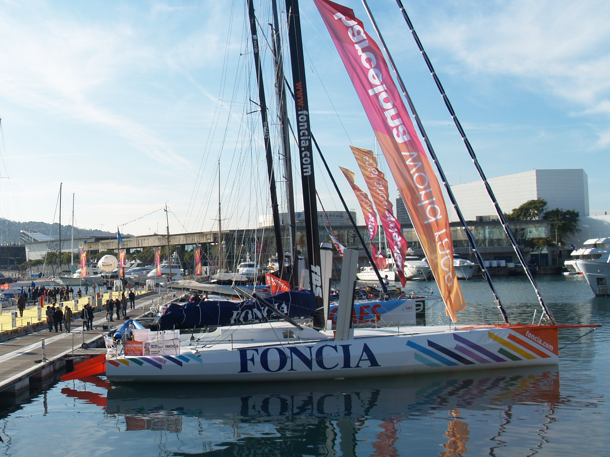 Le 60 pieds IMOCA Foncia 2, skippé par Michel Desjoyeaux et François Gabart, au départ de la Barcelona World Race 2010.